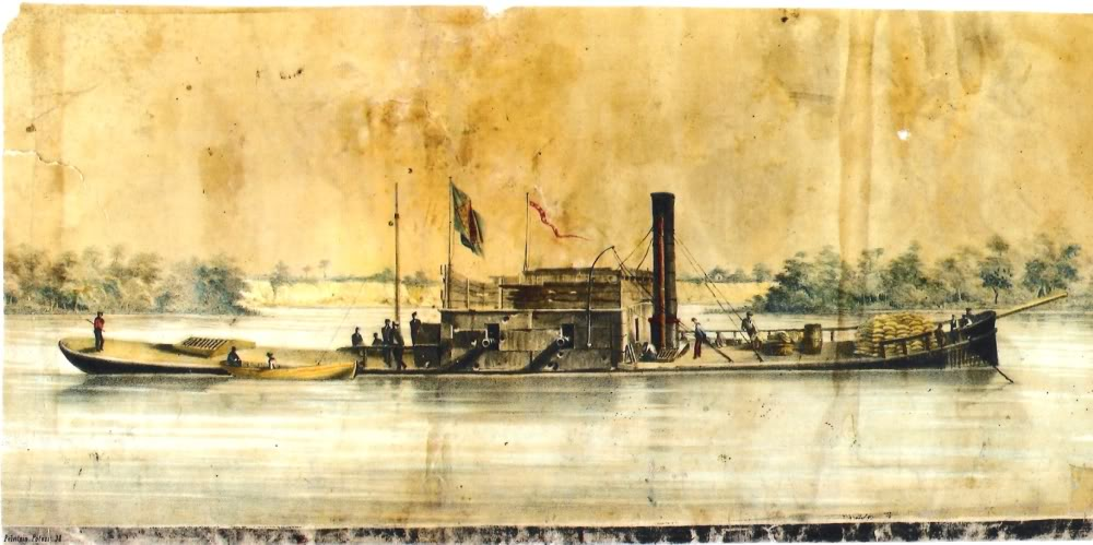 Brazilian ironclad Barroso, launched in 1865